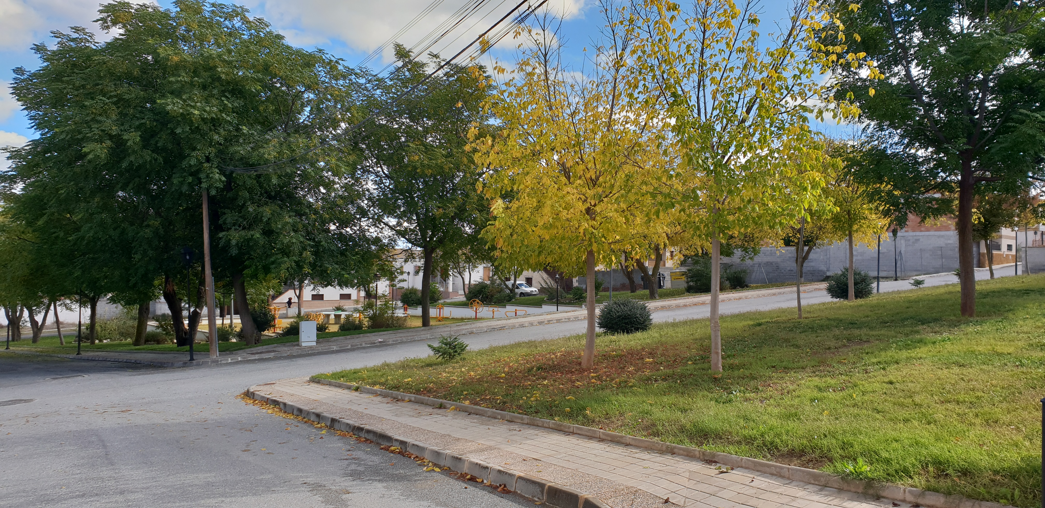 Vista del Parque al-Áchar, en la localidad de Láchar, provincia de Granada (España), en el cruce entre la calle Manuel de Falla y calle Pintor Sorolla.